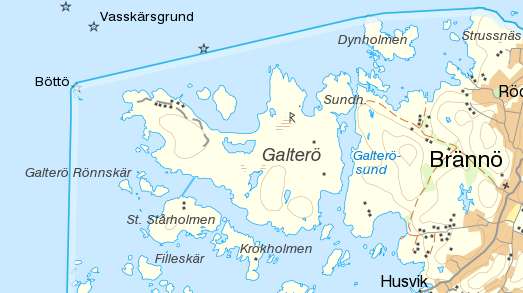 Karta över Galterö med omnejd. Från Topografiska kartan, översiktsversion.